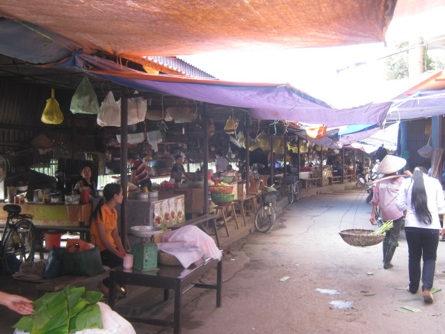 Khu ẩm thực chợ Rồng Ninh Bình, thành phố Ninh Bình